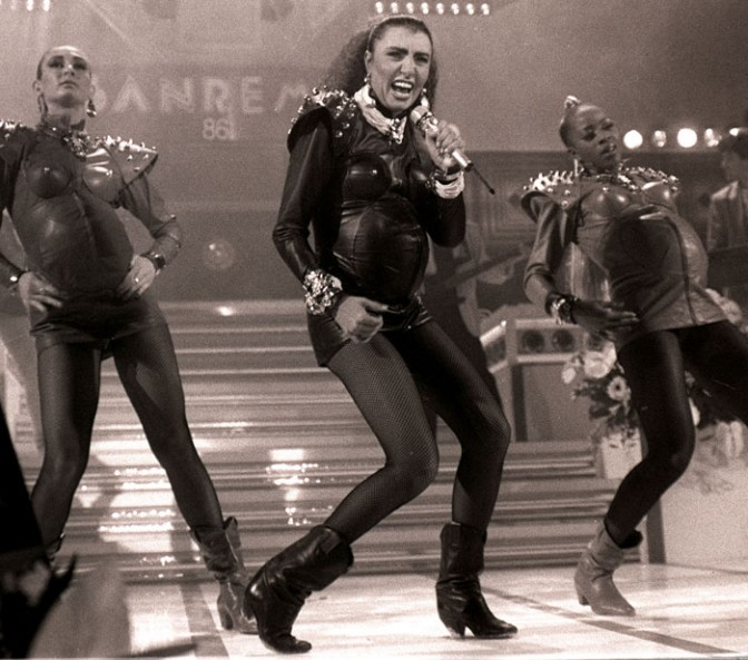 Loredana Bertè sul palco del Festival di Sanremo 1986